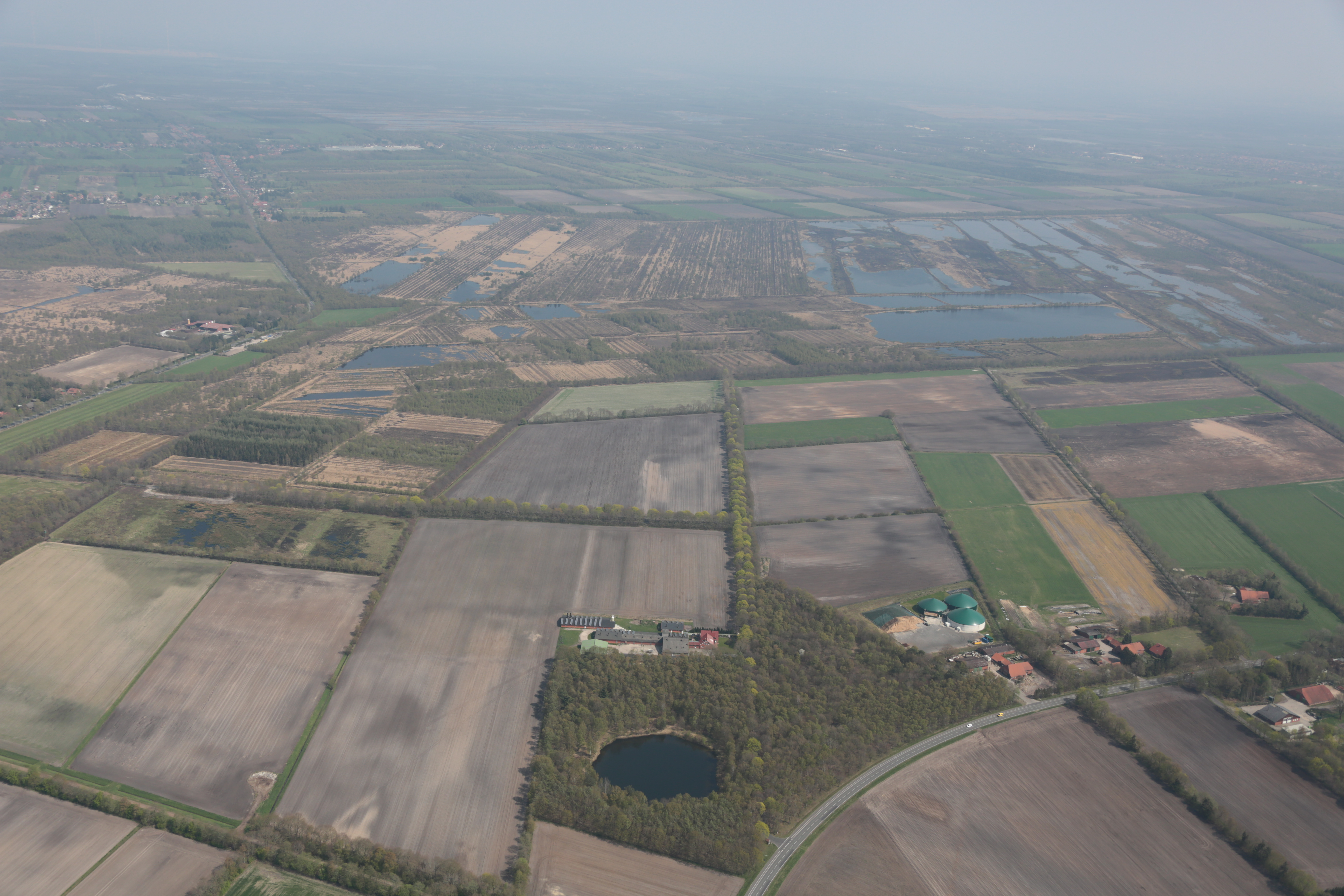 Fotoflug von Nordholz-Spieka nach Oldenburg und Papenburg: Blick von Westen über den Bereich Bärenberg (See unten im Bild) zum Naturschutzgebiet „Aschendorfer Obermoor/Wildes Moor“ in Papenburg This photo was taken by Alchemist-hp. If you use one of my photos, an email (account needed) or a message or direct to: my email account would be greatly appreciated. Please note the license terms. Other licensing terms can get discussed, too. This file is copyrighted and has been released under a license which is incompatible with Facebook's licensing terms. It is not permitted to upload this file to Facebook.